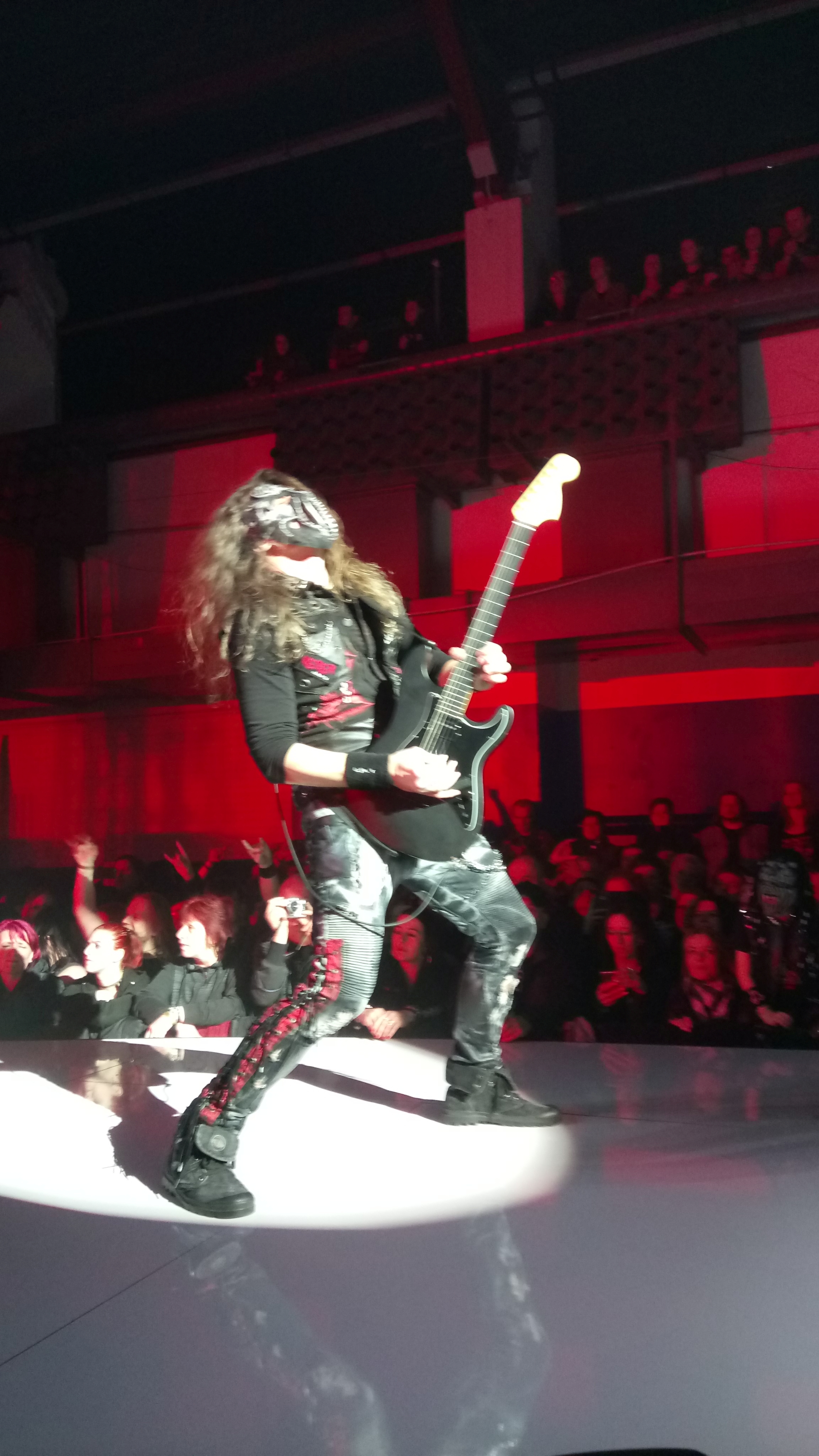 Jiří Urban ml. - Megakoncert Monstrum (Praha, Malá sportovní hala, 23.3.2018)